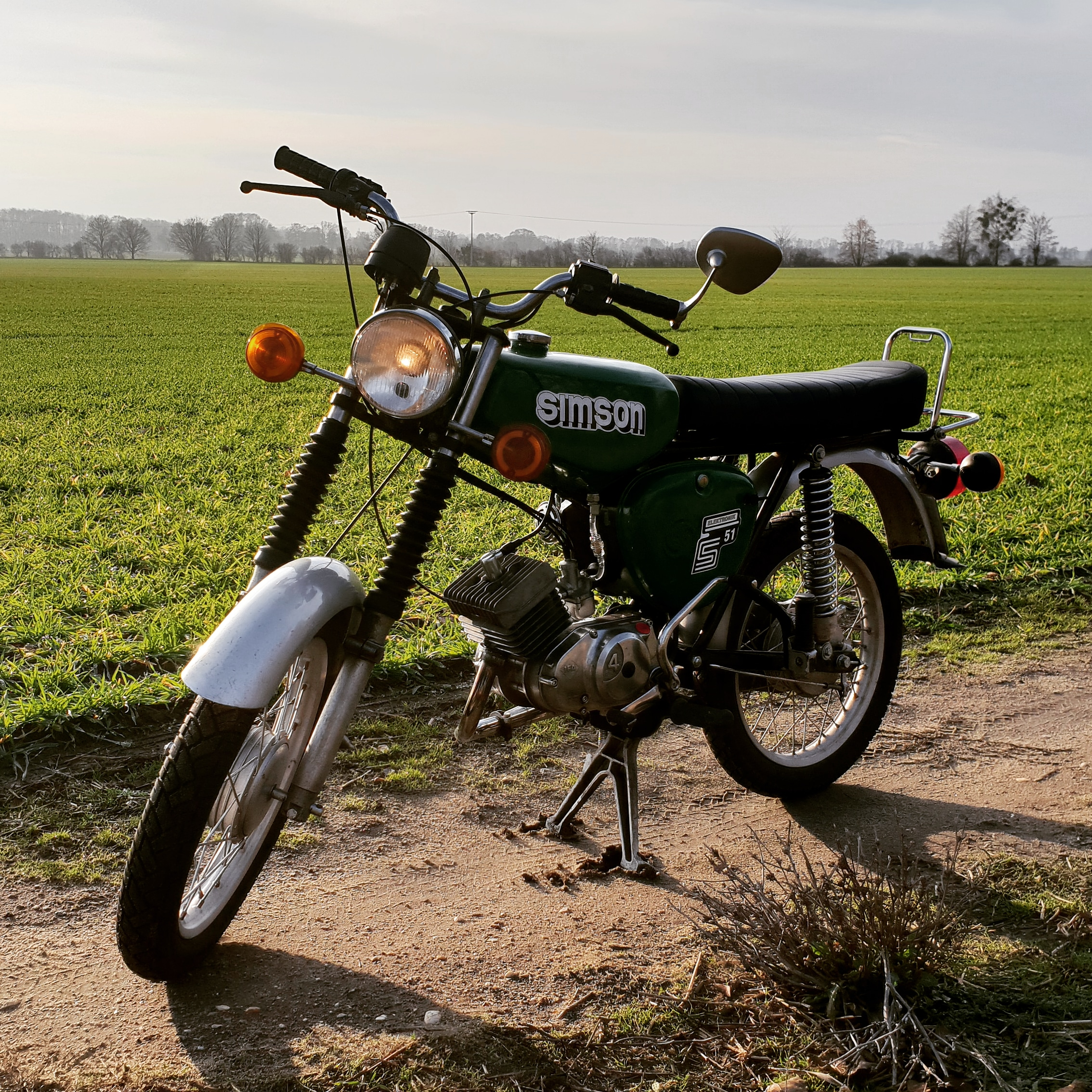 Simson S51 Elektronik